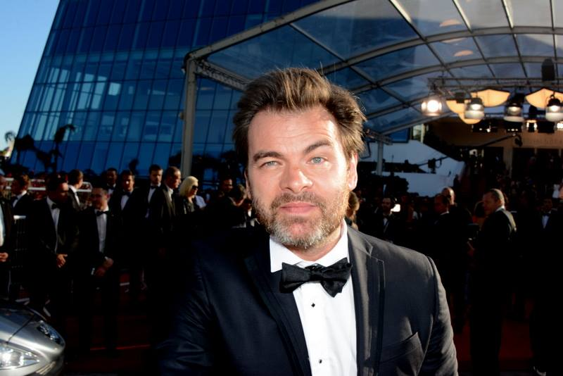 Clovis Cornillac au festival de Cannes